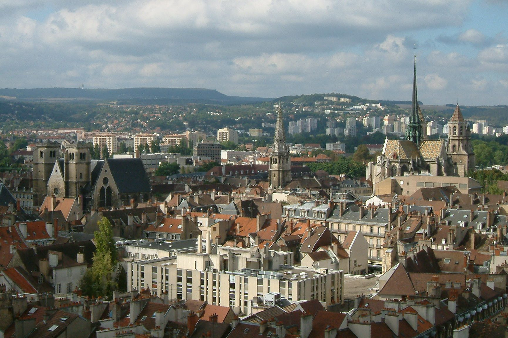 Différentes églises de Dijon : cathédrale Saint-Bénigne, église Saint-Philibert et parvis Saint-Jean. Vue de Dijon du haut de la tour Philippe le Bon, Dijon, Bourgogne, FRANCE.